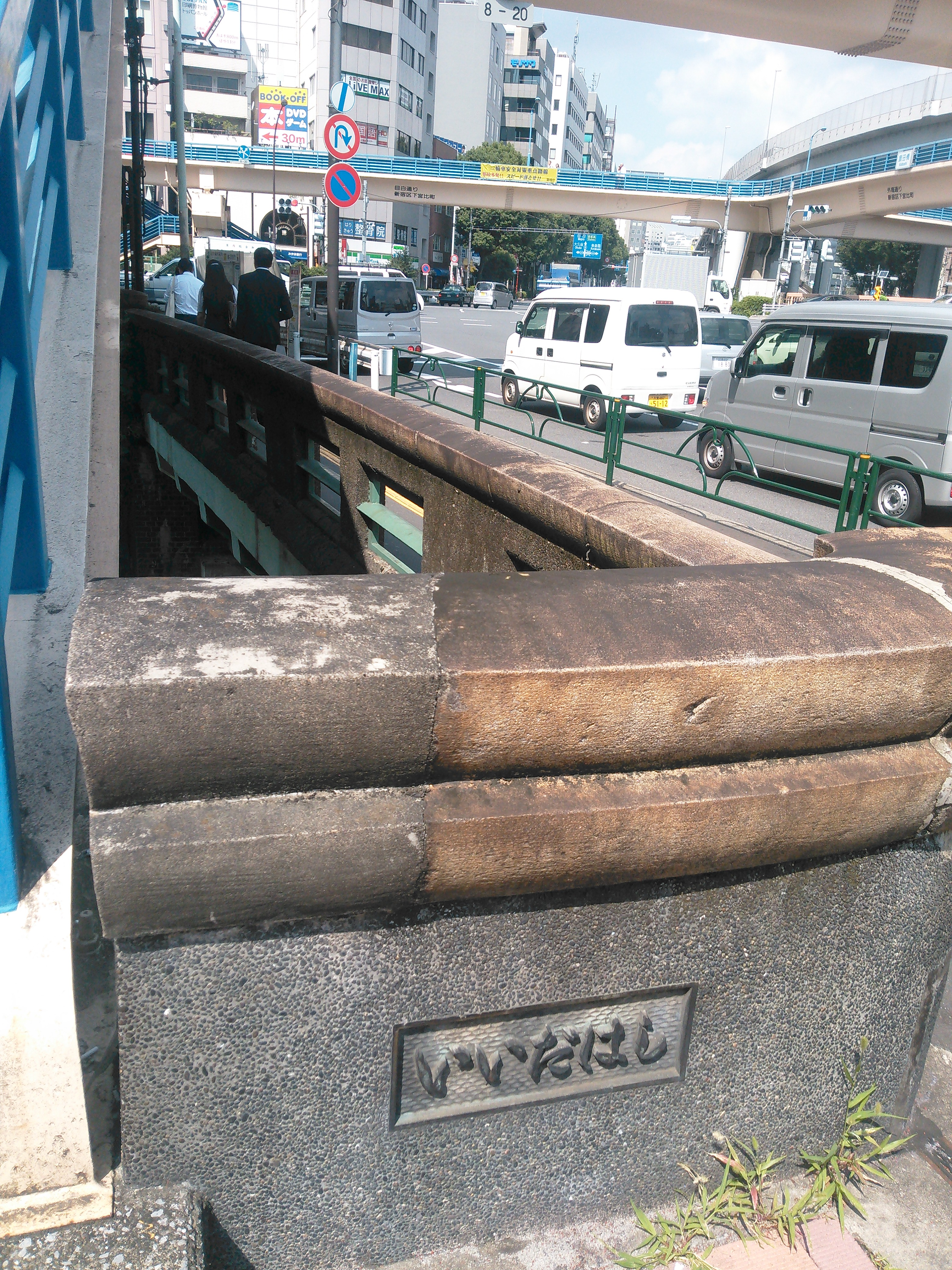 東京都千代田区・新宿区境。目白通りが外堀を渡る小さな橋、「飯田橋」